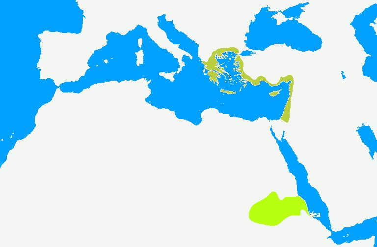 Área de distribución de Emberiza caesia.